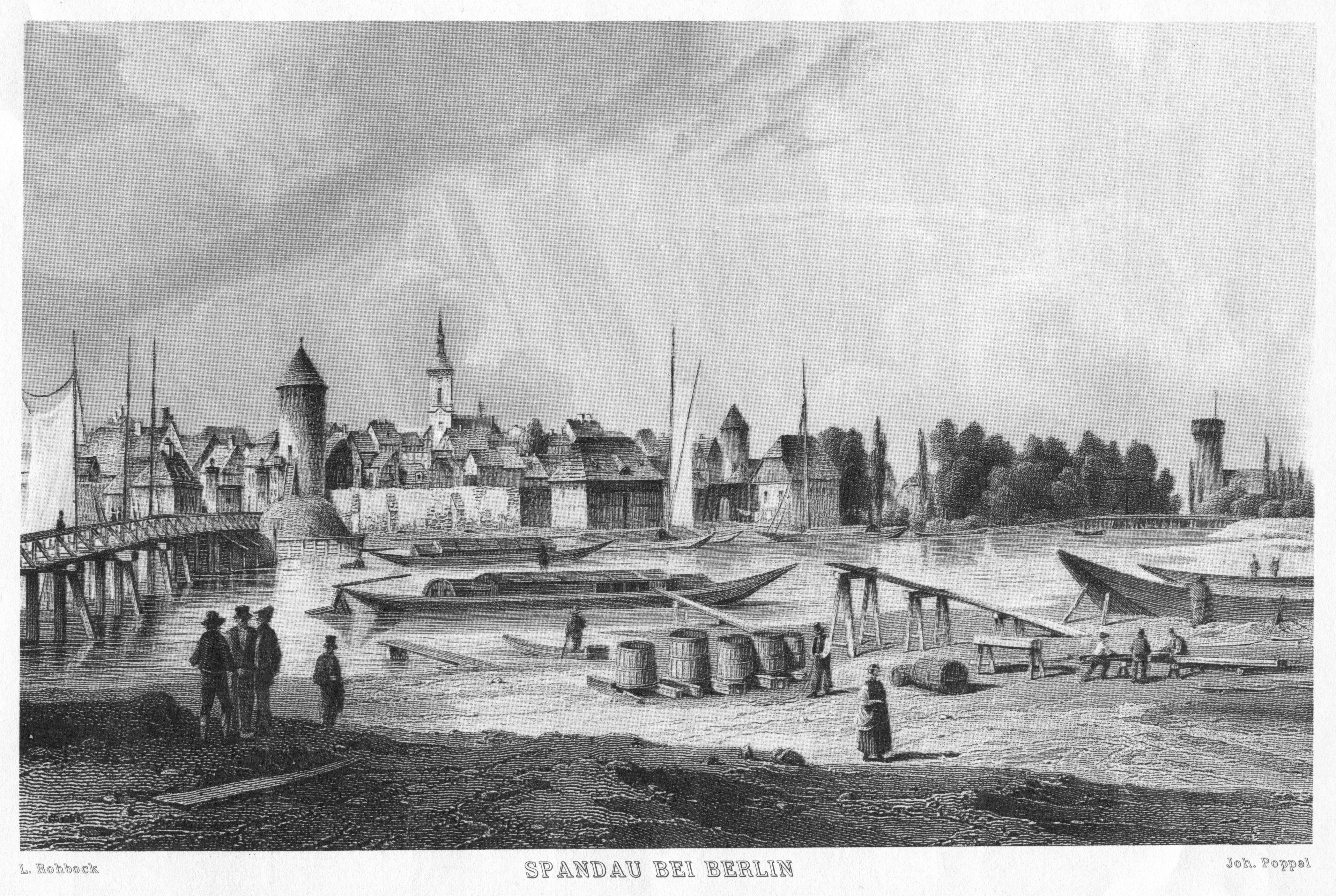 Historische Ansicht von Spandau bei Berlin. Stahlstich. Blick vom Stresow auf die Altstadt von Spandau. Im Vordergrund der Schiffsbauplatz auf dem Stresow, links die Stresow-Brücke (später Charlottenbrücke)